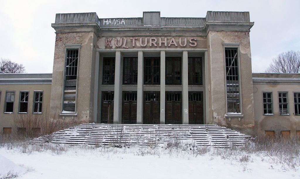 Das ehemalige Kulturhaus Zinnowitz